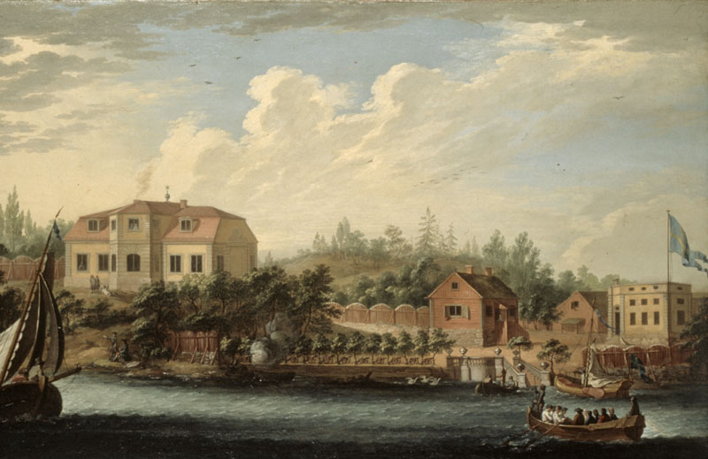 Svindersvik, utsikt från Saltsjön